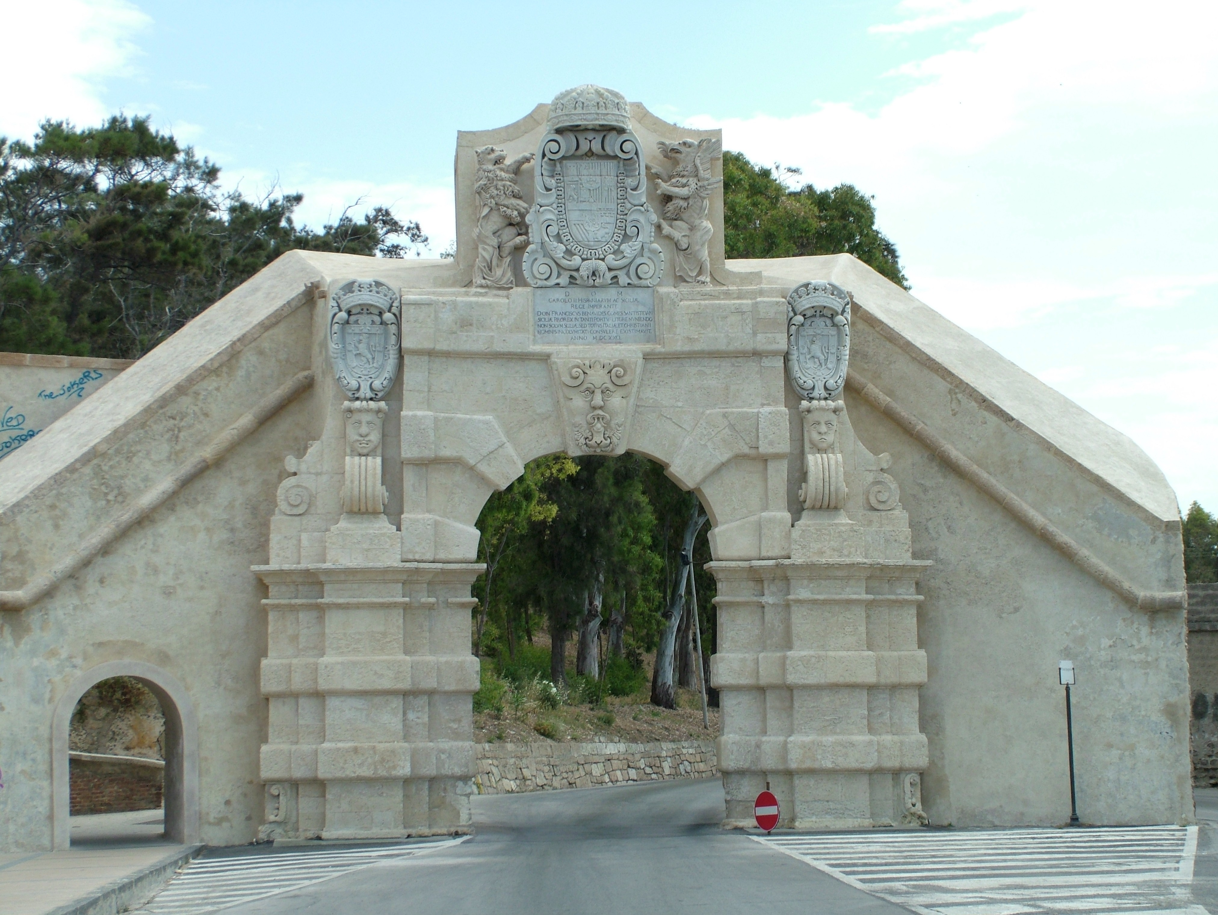 Augusta, Sizilien, Spanische Tor